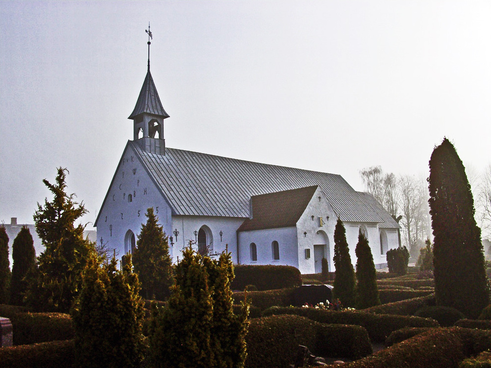 fra sydvest